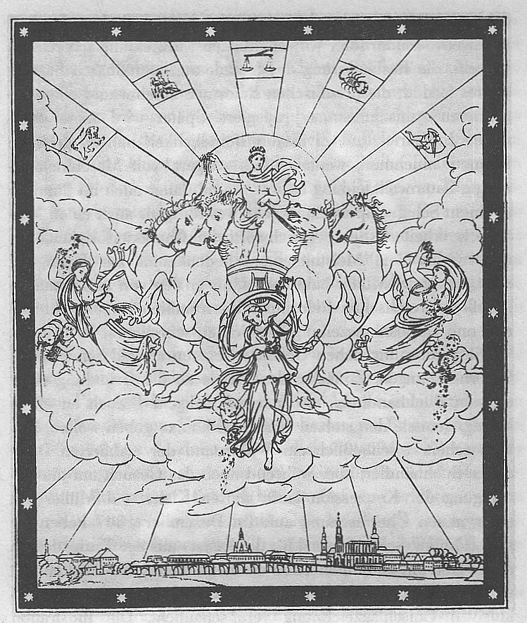 Titelholzschnitt der von Heinrich von kleist herausgegebenen Zeitschrift "Phöbus - Ein Journal für die Kunst"